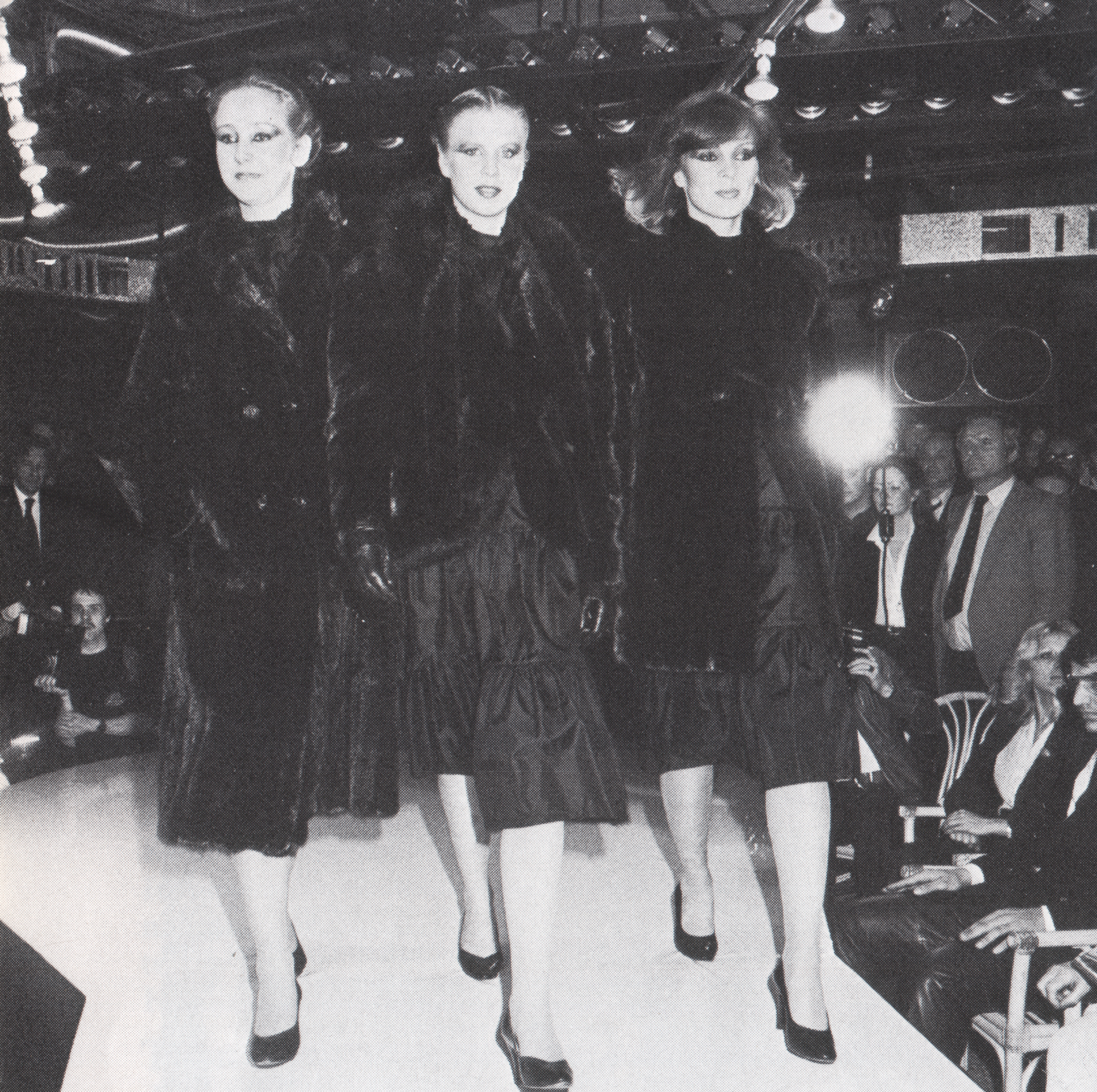 SAGA-Pelzmodenschau im Dorian Gray, Frankfurt am Main, 1981, anlässlich der Pelzmesse. In der Mitte Andrea Zoern, Tochter des Hamburger Kürschners, Modedesigners und Fotografen Dieter Zoern.